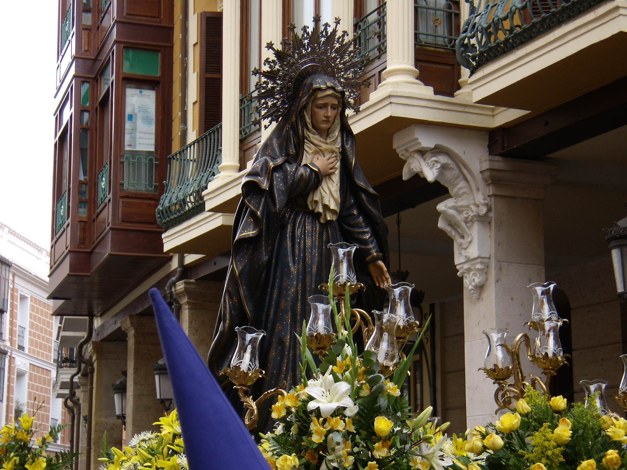 Nuestra Madre la Virgen de la Amargura, de Victor de los Ríos (1955). Semana Santa de Palencia.